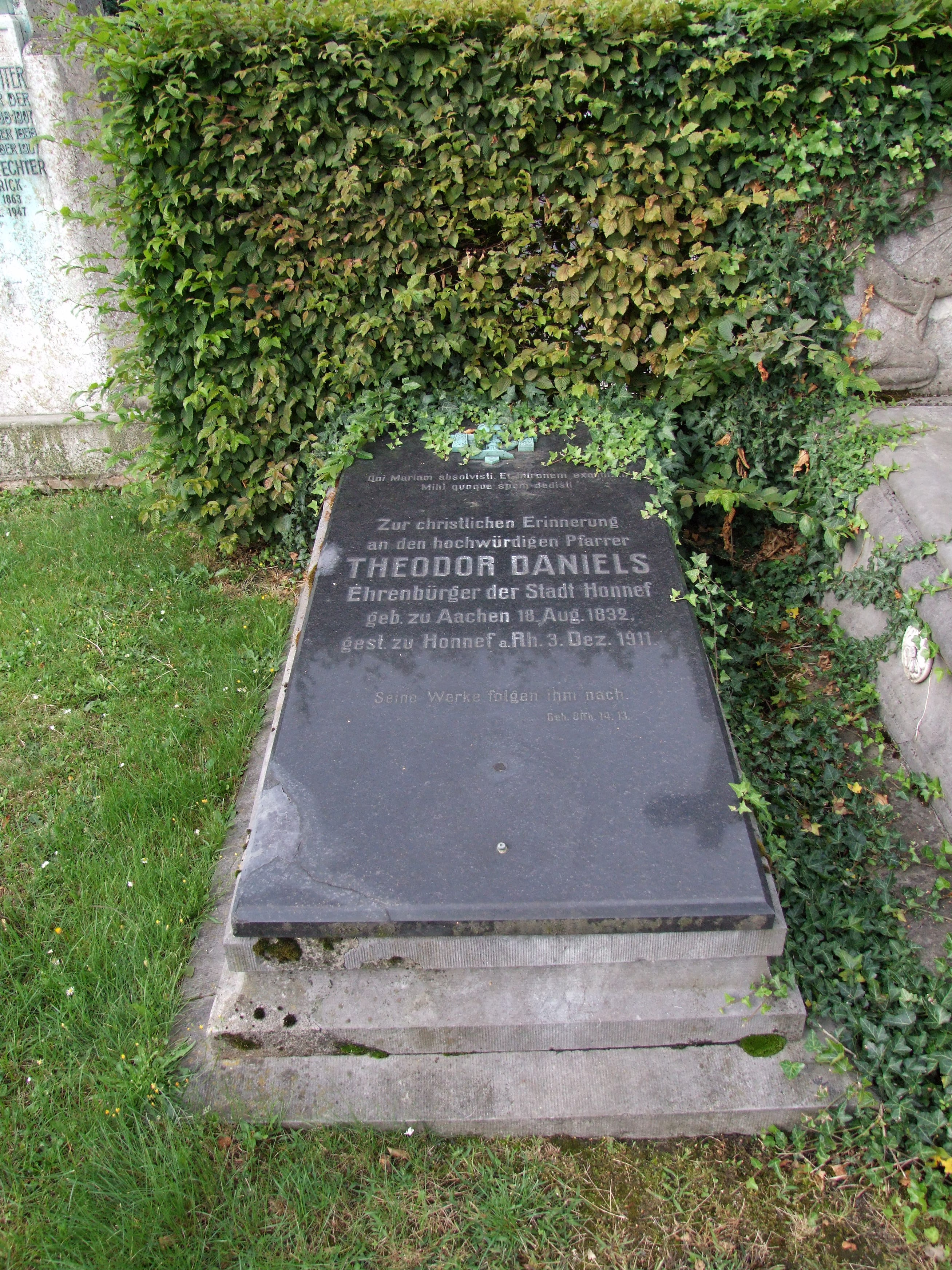 Grab von Theodor Daniels auf dem Alten Friedhof in Bad Honnef